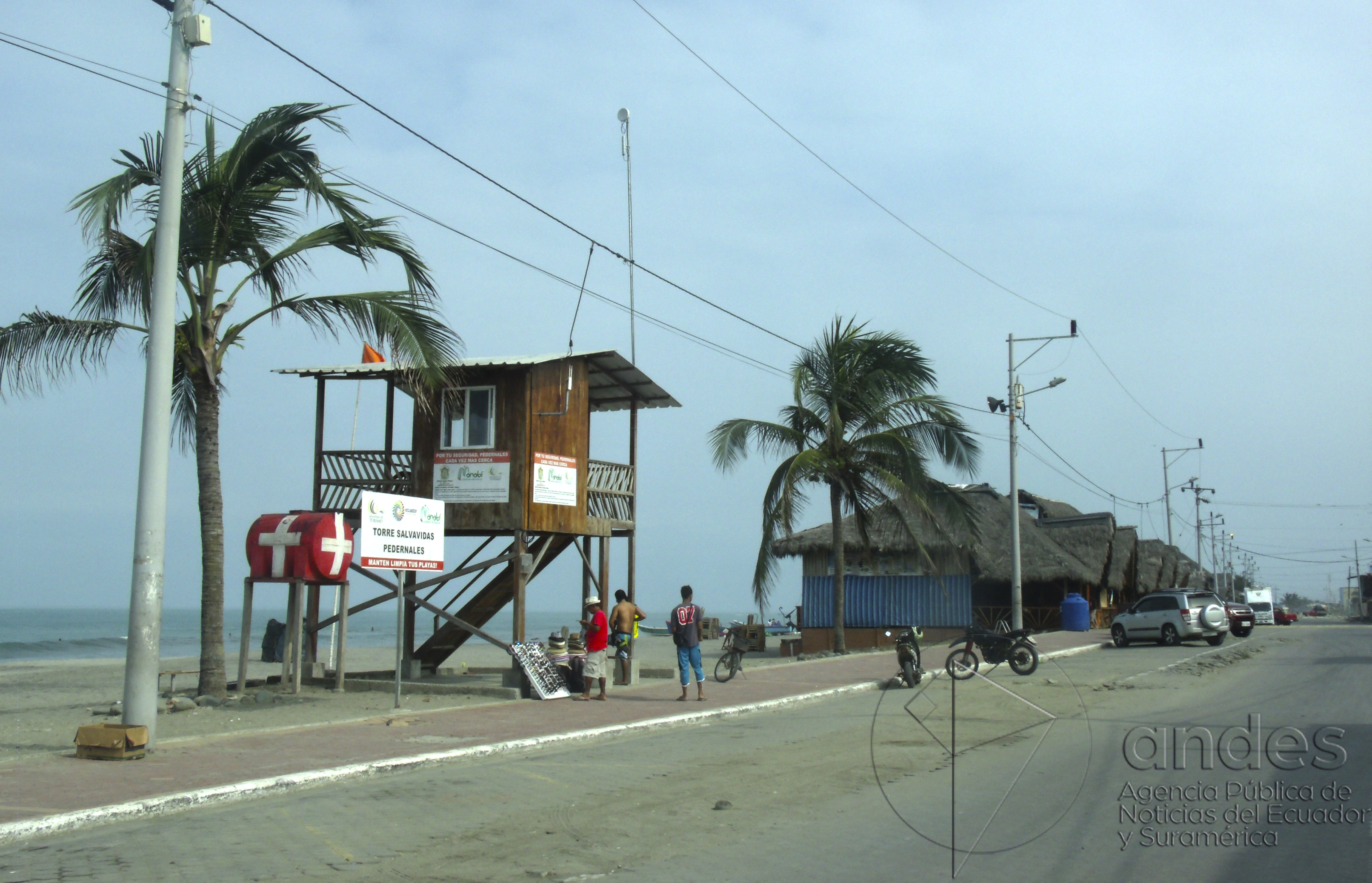 Pedernales, 30 dic (Andes).- Ocho meses después del terremoto de 7.8 grados, el cantón Pedernales avanza en la reconstrucción de sus viviendas y negocios. El gobierno construye planes habitacionales mientras otros levantan sus casas con sus propias manos. ANDES/Dayana Vinueza.